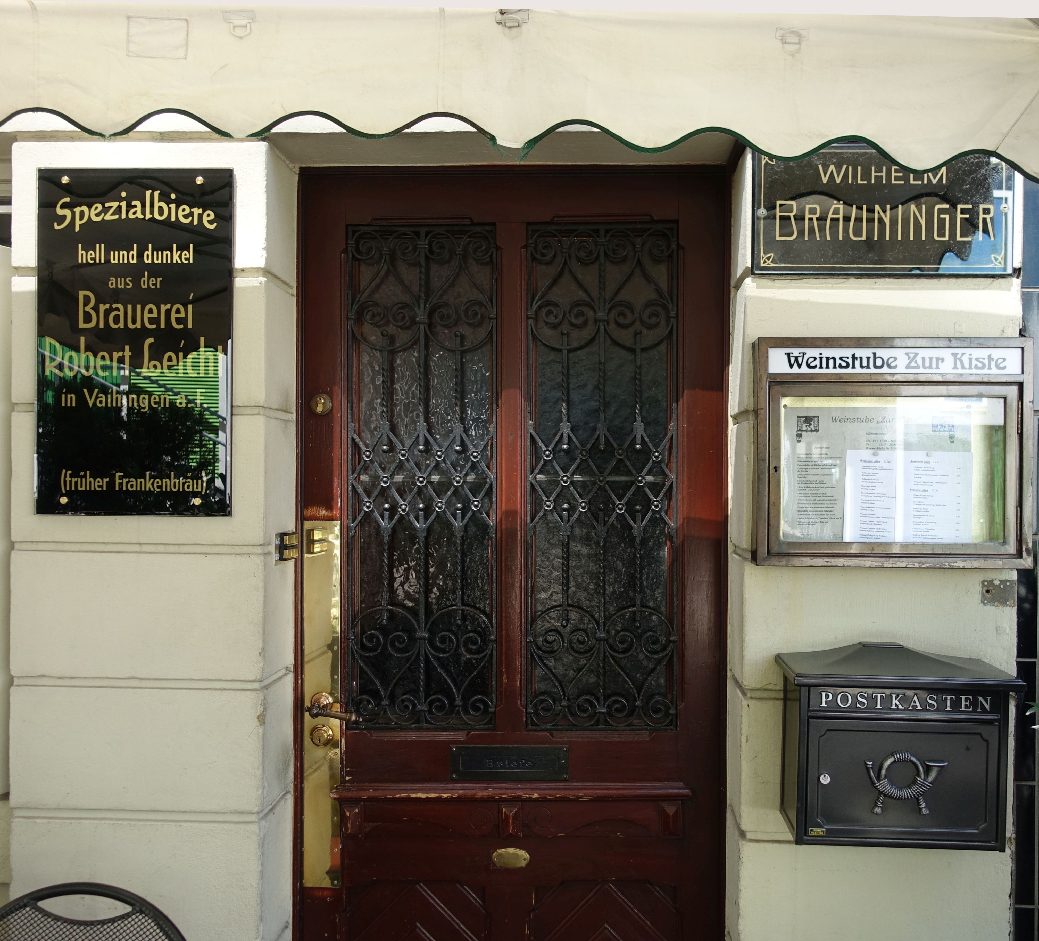 Eingang der Restauration zur Kiste in Stuttgart, Kanalstraße 2, mit dem Namensschild der esitzer Wilhelm Bräuninger senior und junior.